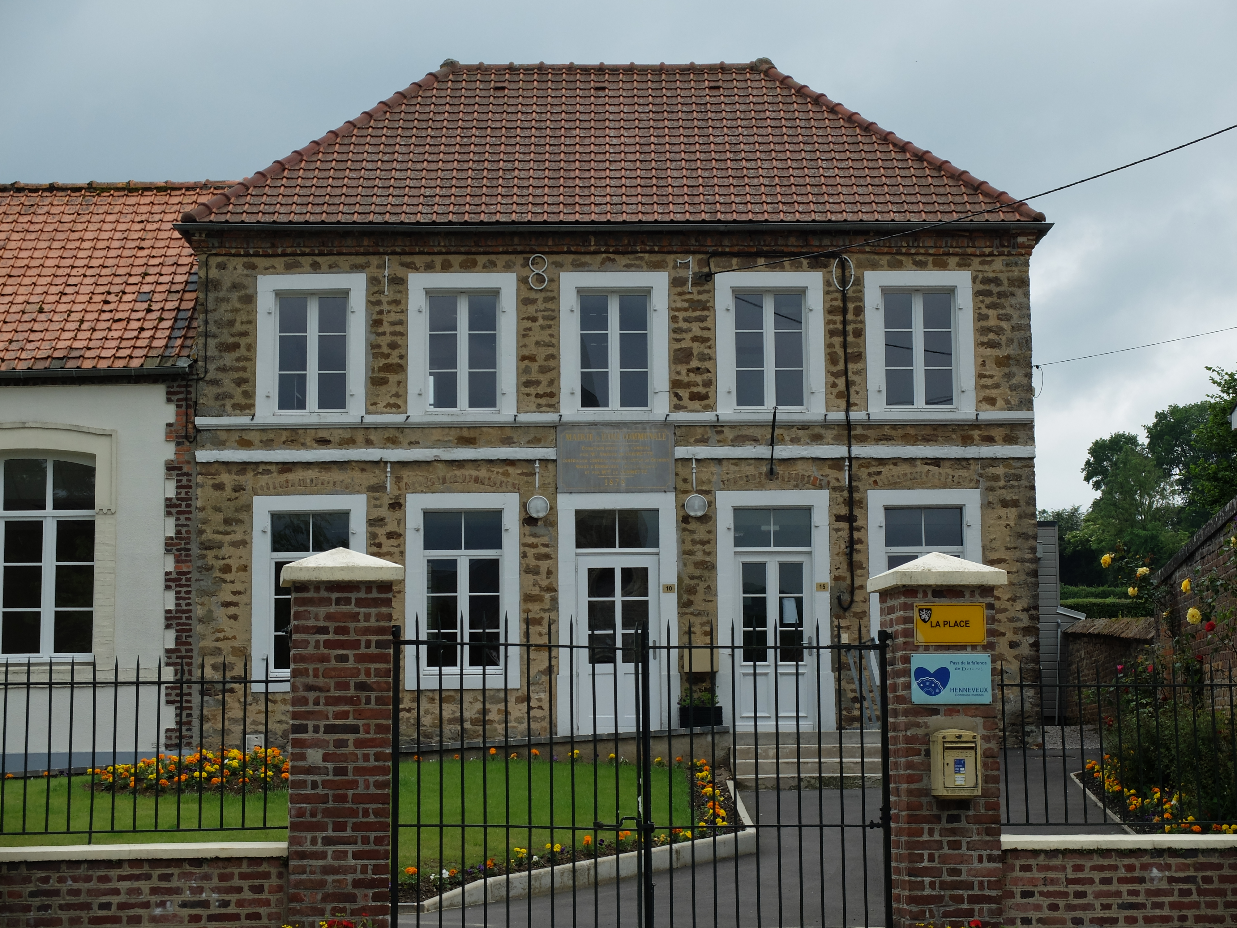 Vue de la mairie d'Henneveux.